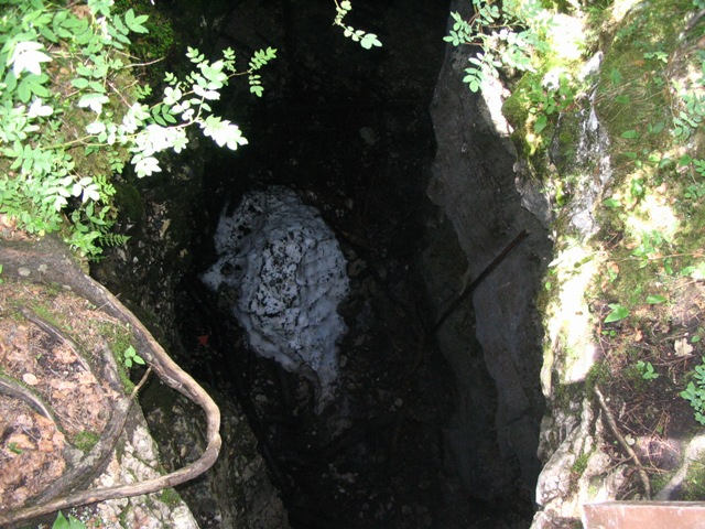 Margériaz - massif de bauges - Glacière ou tanne